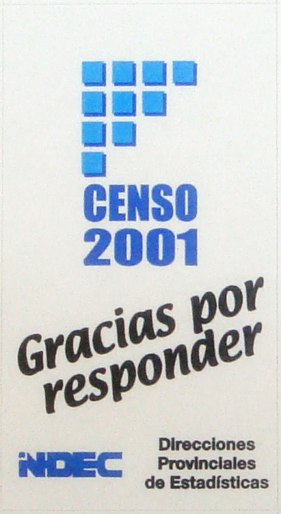 Etiqueta utilizada en el Censo Nacional de Población, Hogares y Viviendas del año 2001.